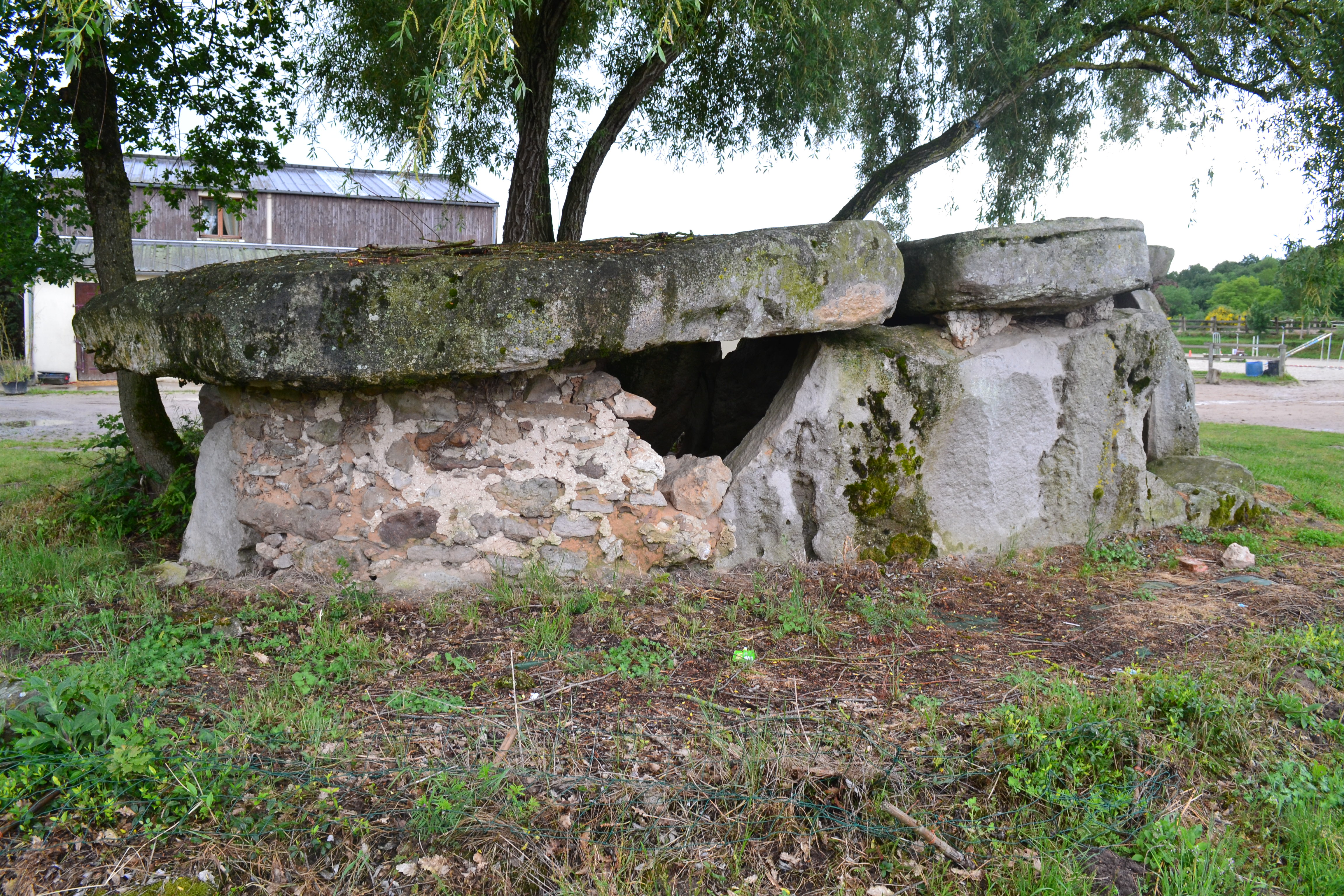 Dolmen du Bois du Feu, Saint-Hilaire-Saint-Florent